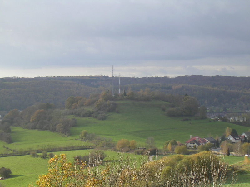 Rattem. Allgemenges zum Bild: Dëst Bild weist de Rattem, eng hiwwelähnlech Erhiewung zu Uewerkuer (Gemeng Déifferdeng) aus der Siicht vum Bieleser Gaalgebierg.